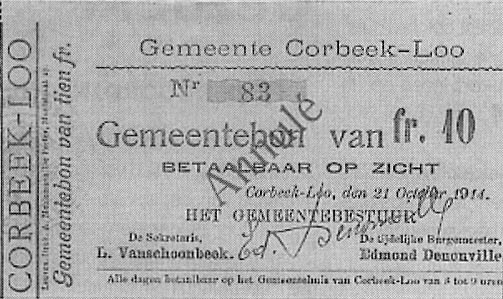 Om de noodlijdende bevolking van Korbeek-Lo te helpen reikte de gemeente vanaf 21 oktober 1914 gemeentebonnen uit, die men kon inruilen voor brood, kolen, enz. Deze gemeentebonnen waren reeds voor de oorlog gedrukt en bestonden in volgende waarden: 50 centiem, 1, 5 en 10 frank. Deze bon komt uit 1914 (zie afbeelding) en is dus al minstens 70 jaar oud.